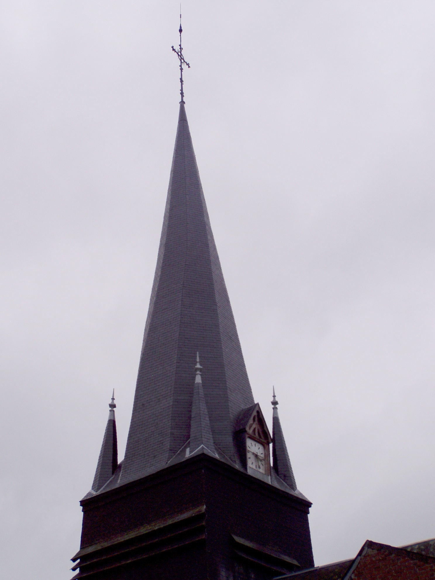 Etreaupont_clocher.jpg